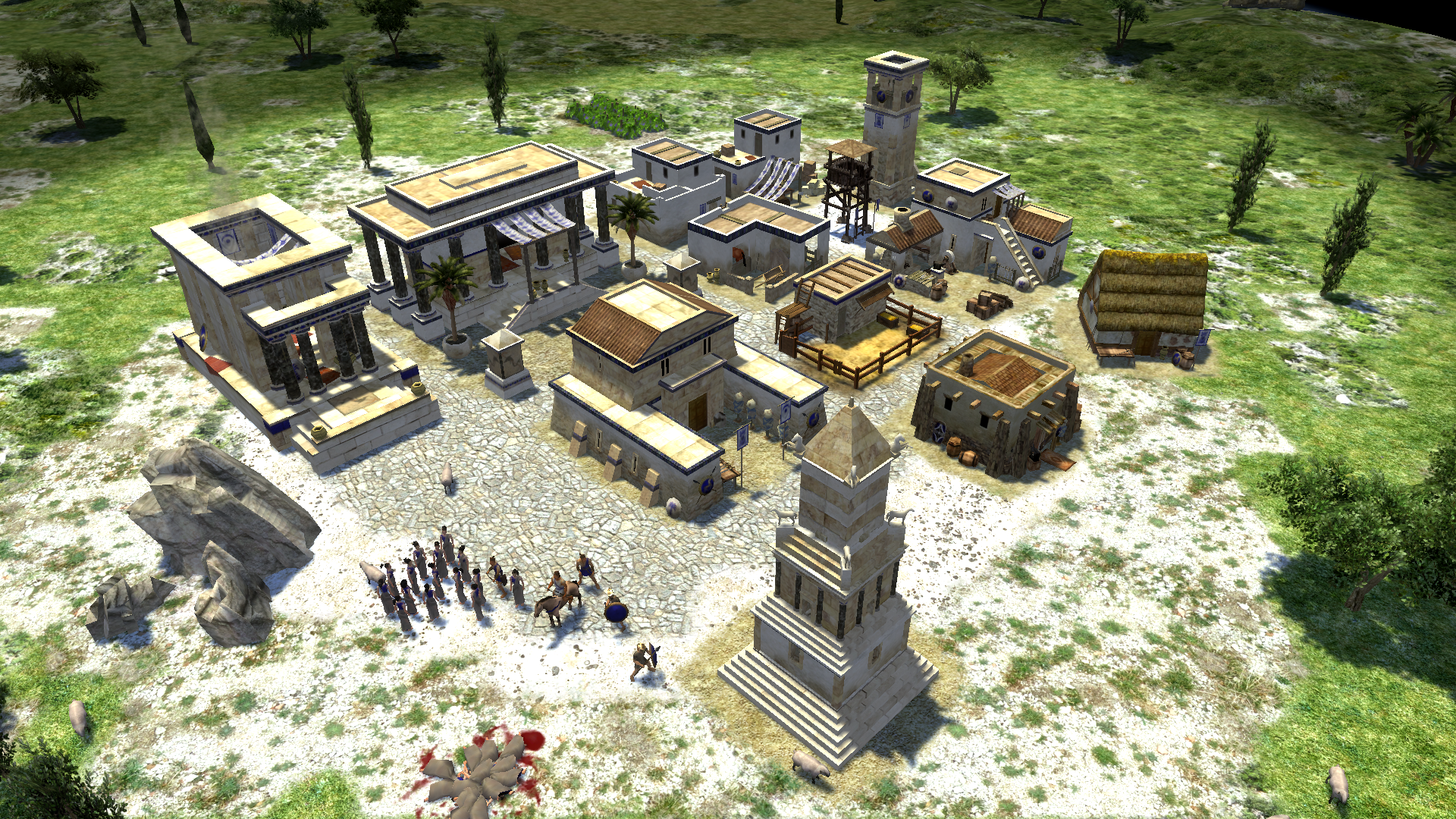 0 A.D. Karthager